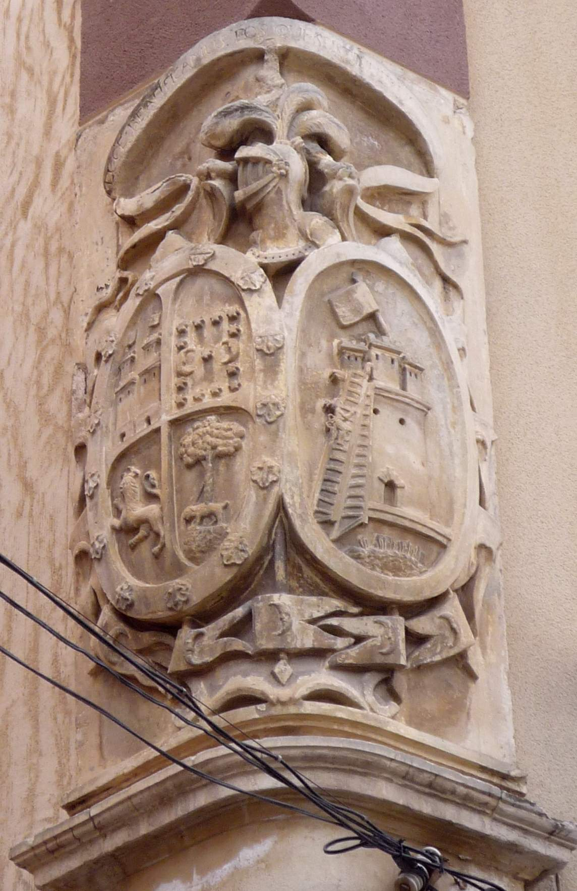 Orihuela - Palacete de los Sorzano Nájera de Tejada (Museo de la Fundación Pedrera)